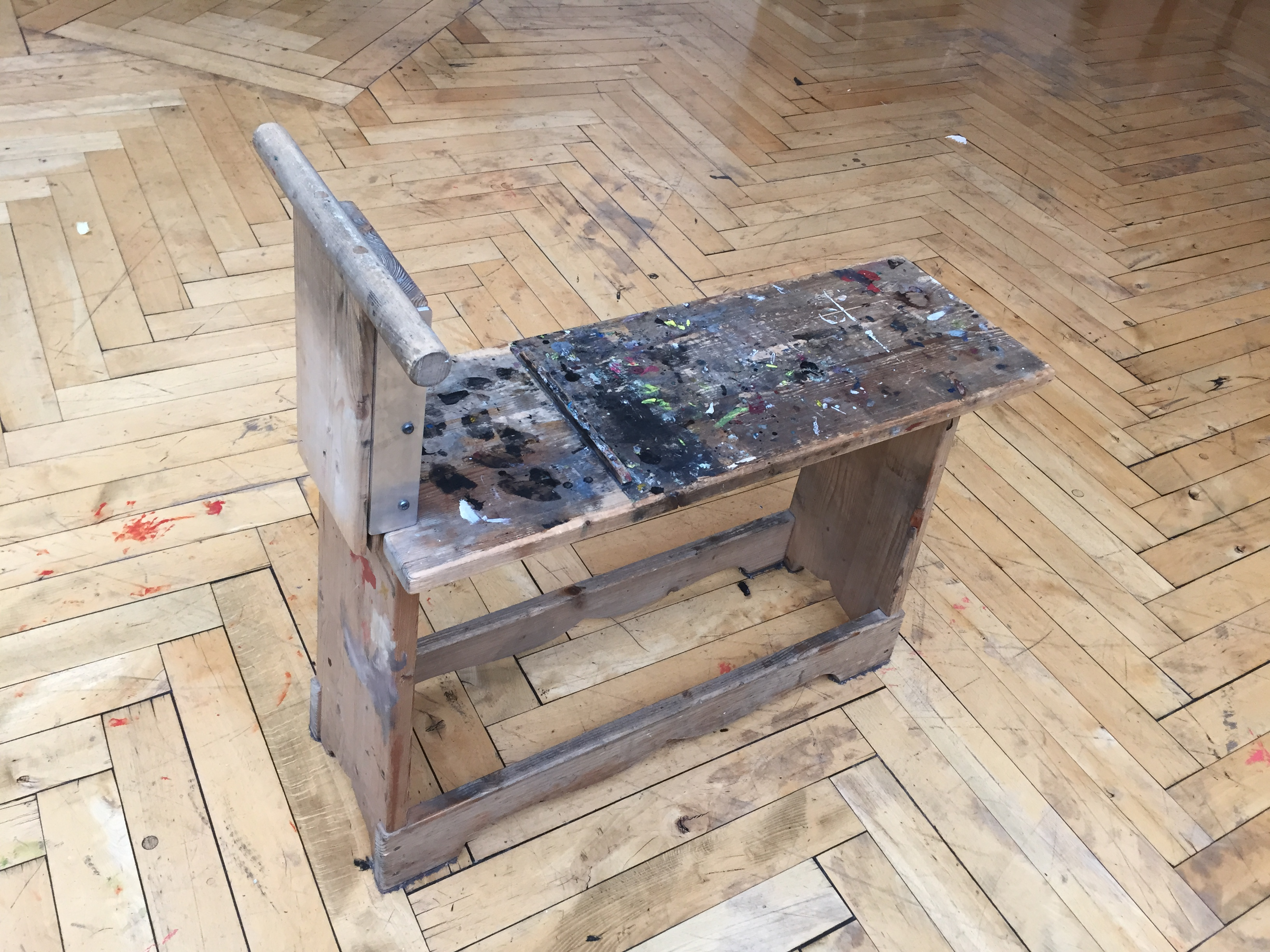 Gesehen an der HSLU, Hochschule für Gestaltung Luzern